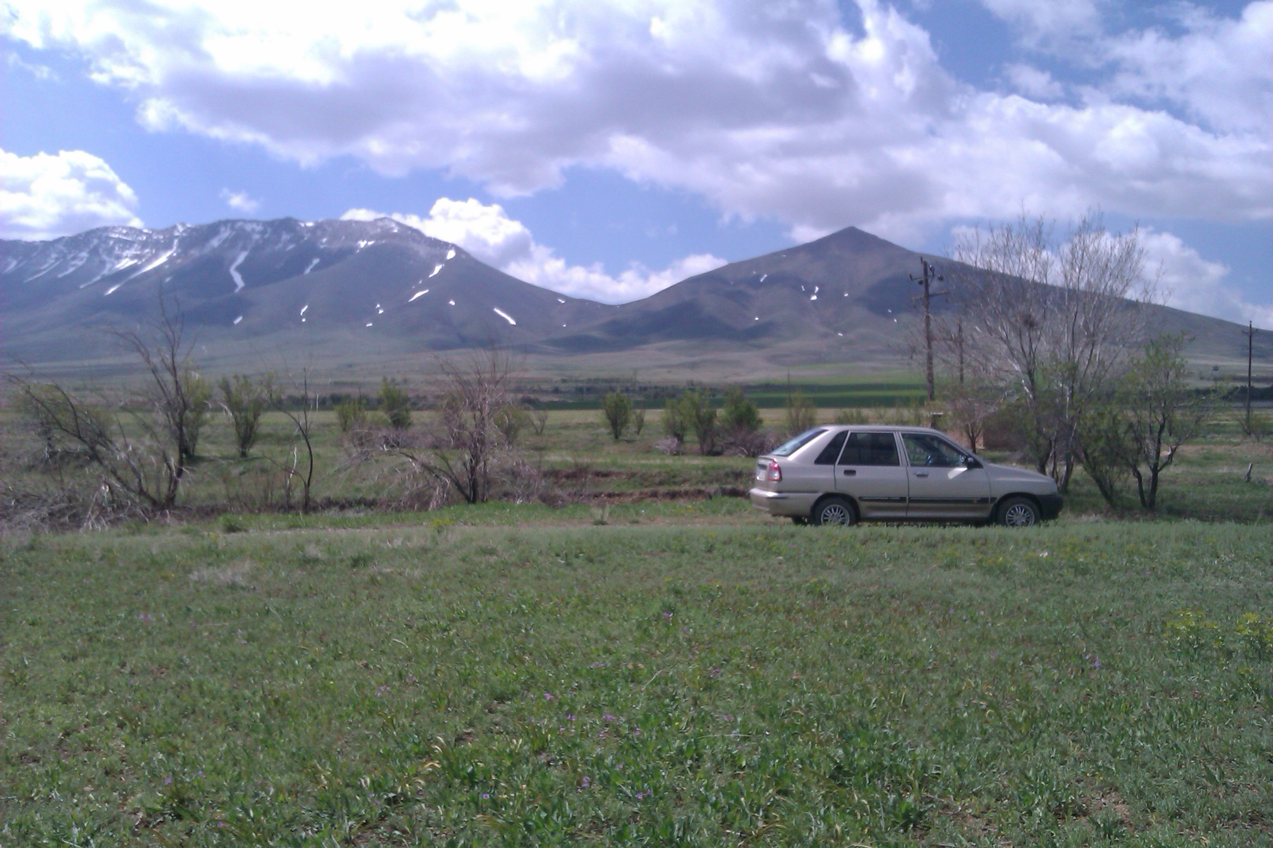 رشته کوههای سیاهتیر و کمر بسته روستای فرج آباد